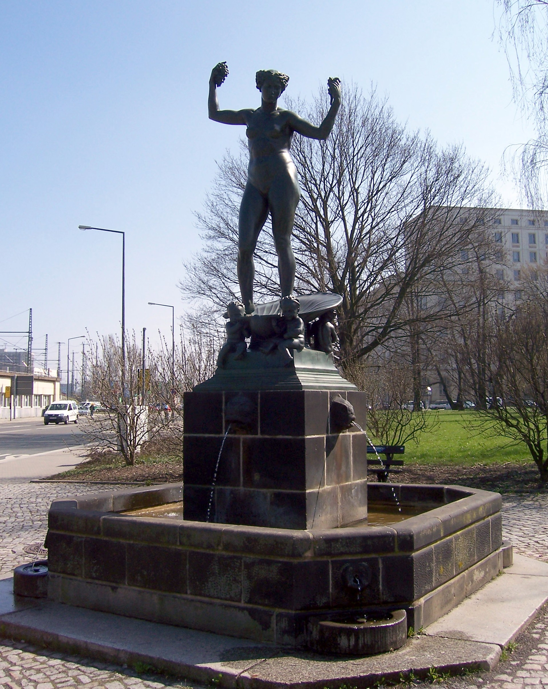 Marie-Gey-Brunnen in der Dresdner Südvorstadt.